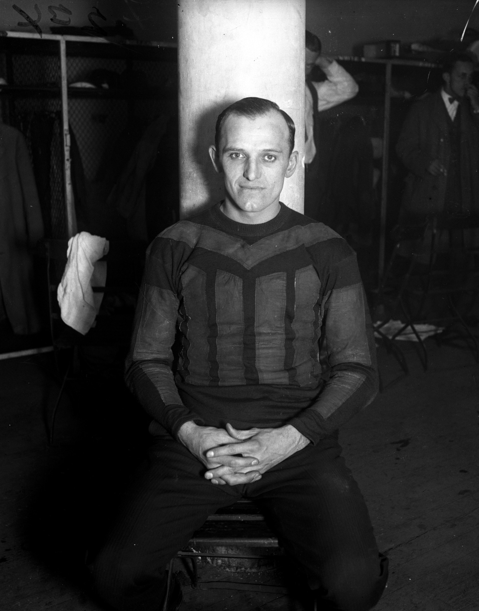 George Halas